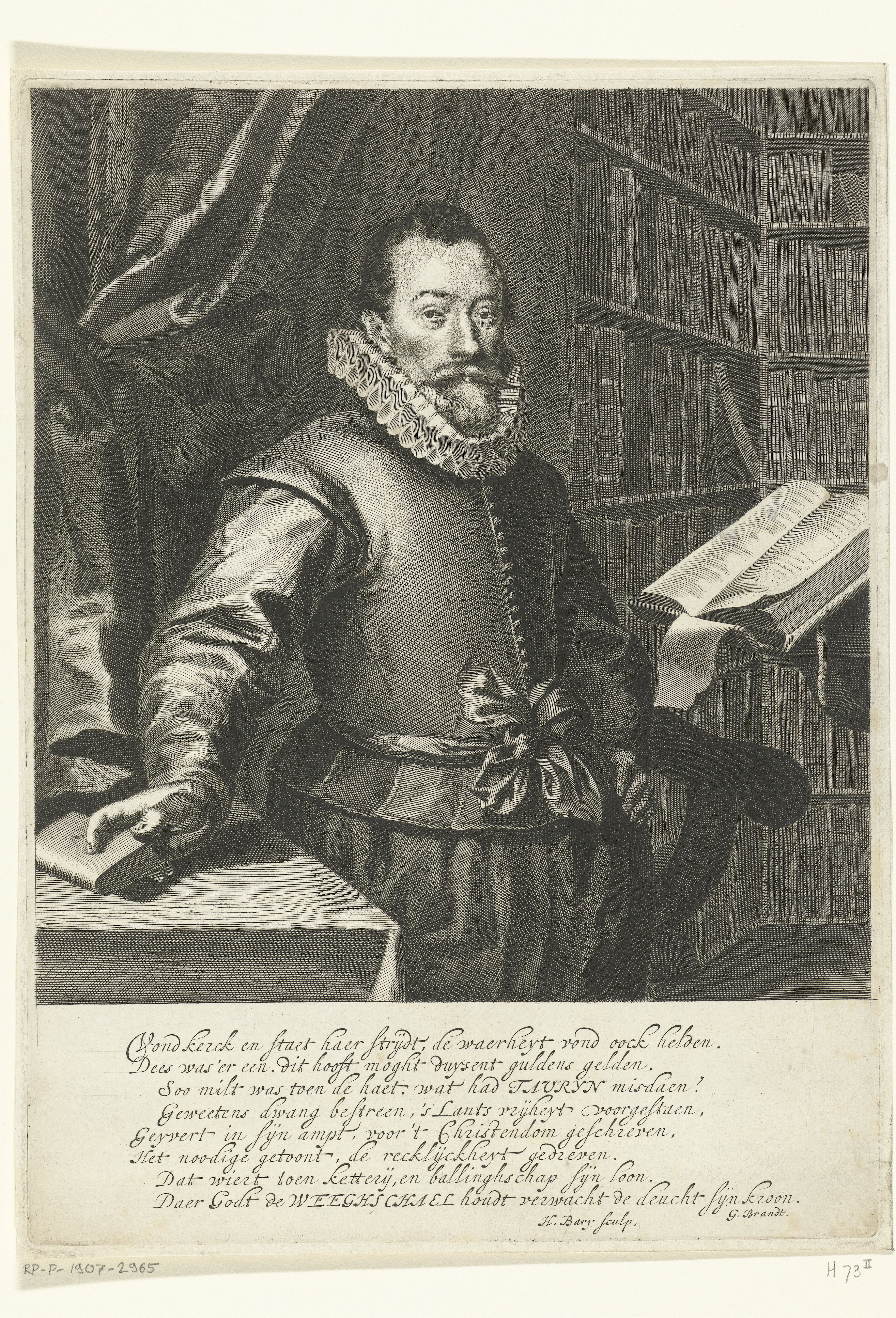 IdentificatieTitel(s): Portret van Jacobus TaurinusObjecttype: prent Objectnummer: RP-P-1907-2965Catalogusreferentie: Hollstein Dutch 73-2(3)Opmerking: 2(4) op basis van de collectie RMAOpschriften / Merken: verzamelaarsmerk, verso midden, gestempeld: Lugt 2166Omschrijving: Portret van Jacobus Taurinus, staand aan een lessenaar in een bibliotheek. Onder het portret een vers van acht regels in het Nederlands.VervaardigingVervaardiger: prentmaker: Hendrik Bary (vermeld op object)schrijver: Geeraert Brandt (I) (vermeld op object)Plaats vervaardiging: NederlandDatering: 1657 - 1707Fysieke kenmerken: gravureMateriaal: papier Techniek: graveren (drukprocedé)Afmetingen: plaatrand: h 278 mm × b 203 mmOnderwerpWat: study; 'studiolo'; libraryWie: Jacobus TaurinusVerwerving en rechtenVerwerving: aankoop 1905Copyright: Publiek domein